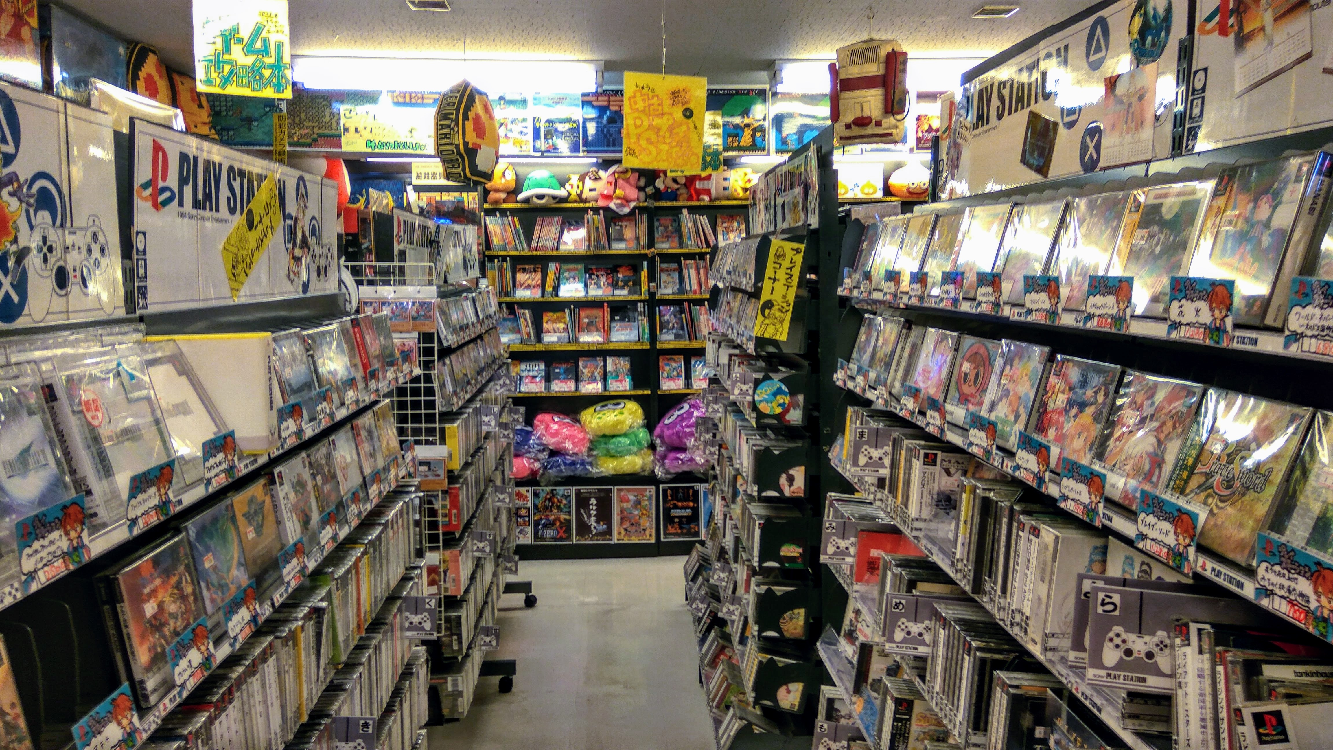 Interior de la tienda de videojuegos de segunda mano Super Potato, en Akihabara (Tokio)